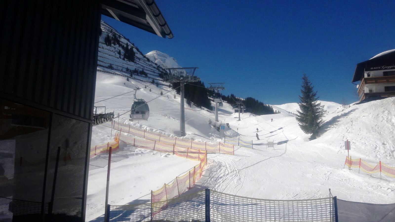 Totale der Dorfbahn Warth